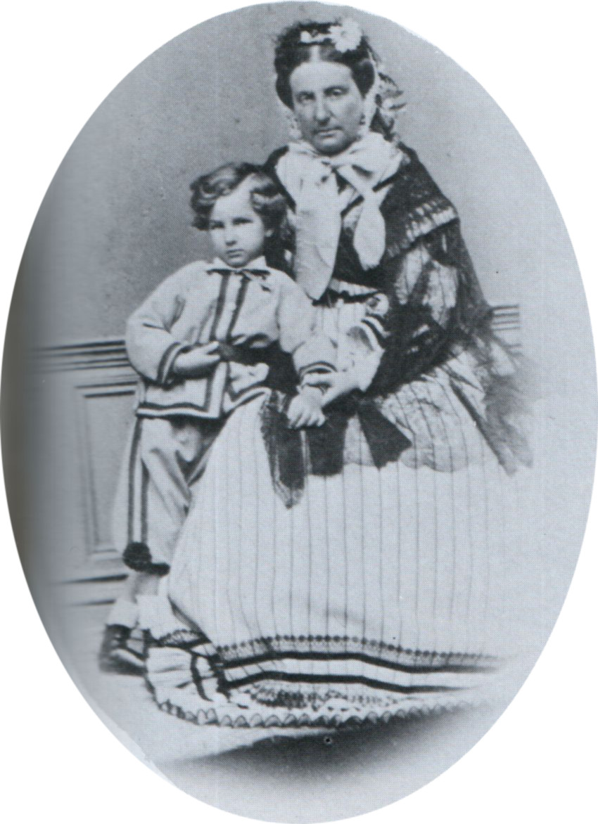 Clementina de Orleans y su tercer hijo, Fernando, futuro zar de Bulgaria, en 1866.